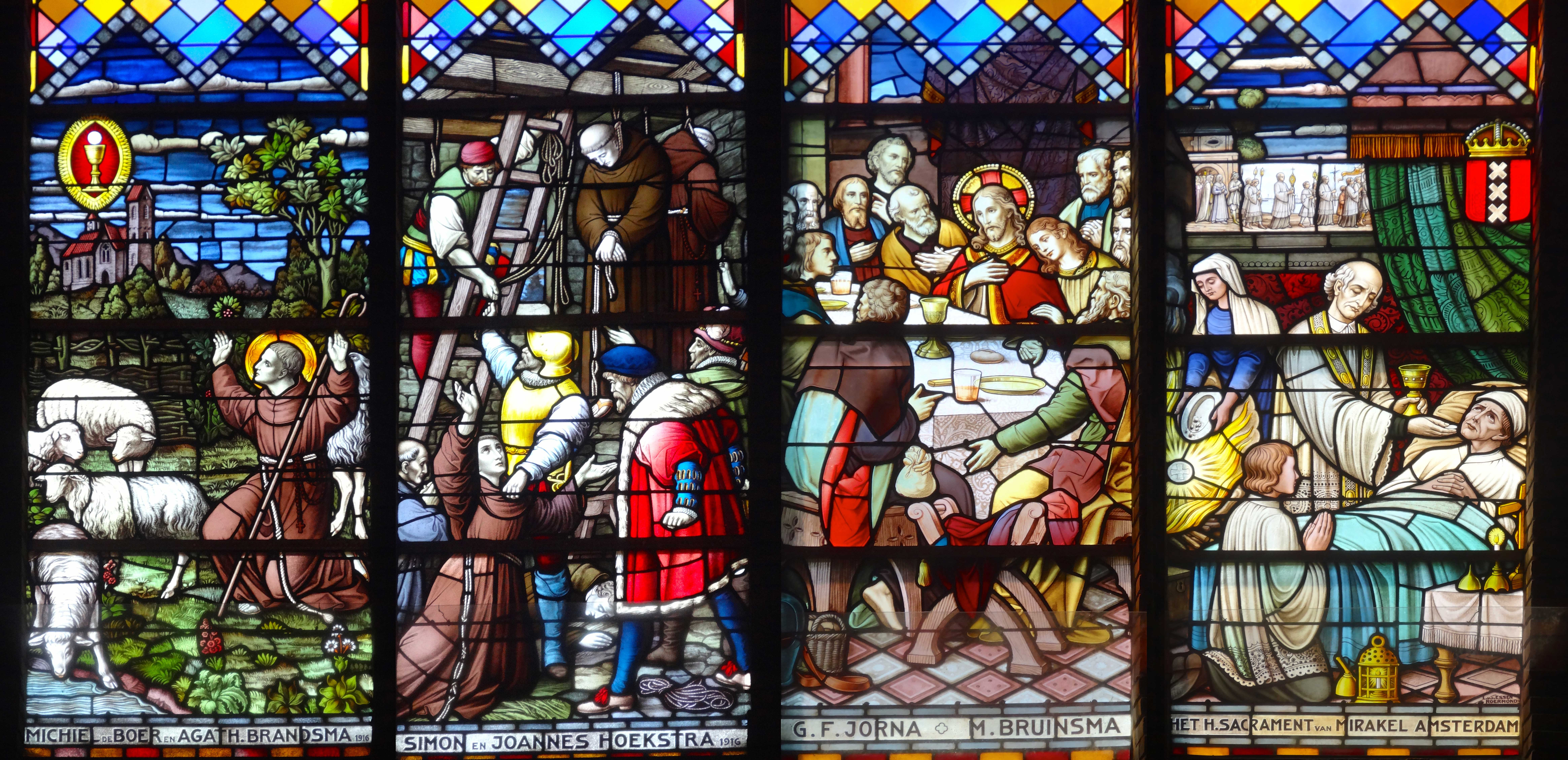 Gebrandschilderde glazen in de Sint-Franciscuskerk in Bolsward